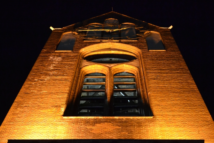 Turm der Reformationskirche in Berlin-Moabit bei Nacht. Blick auf die südliche Turmfassade.